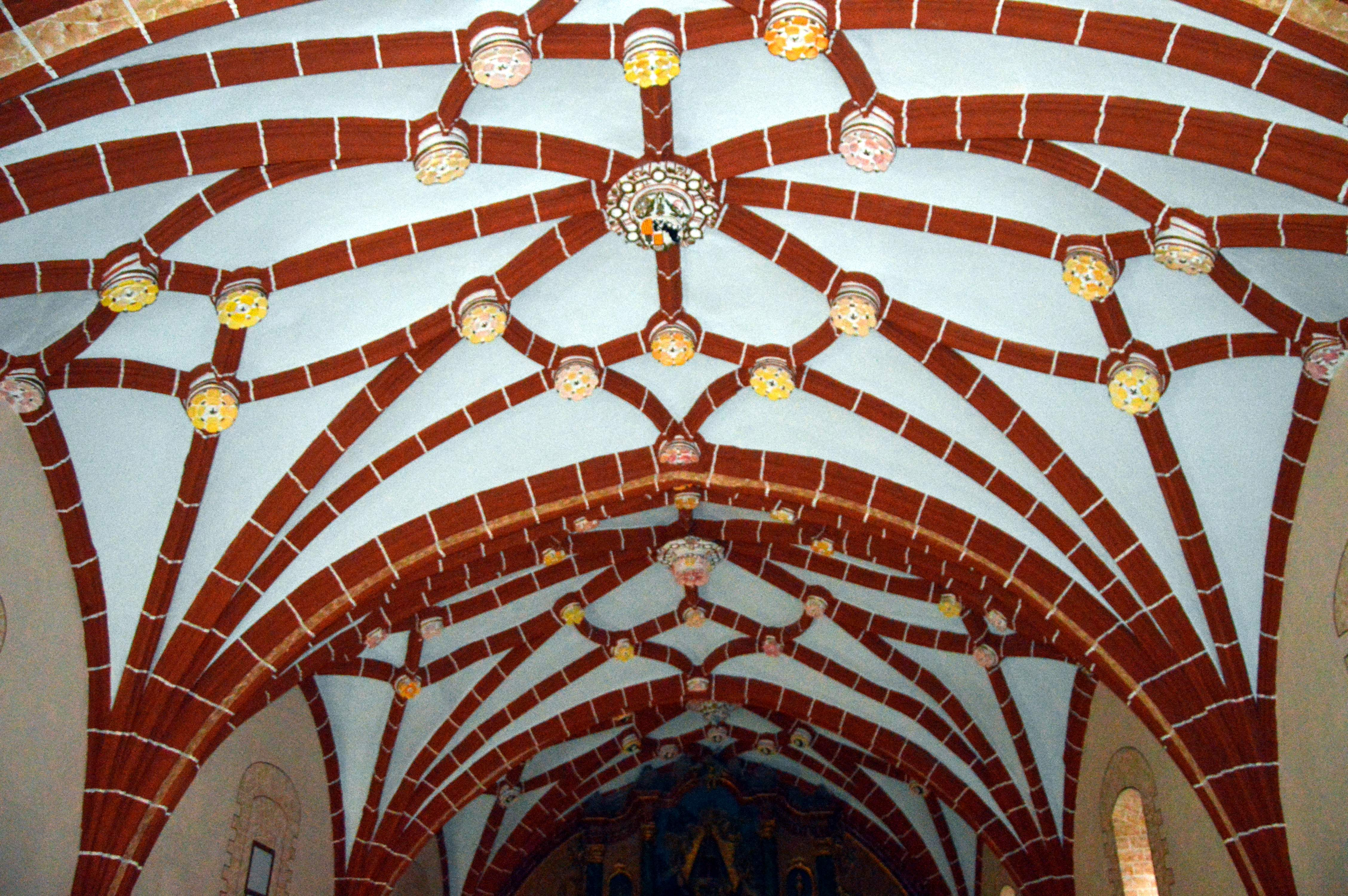 Detalle de la tracería gótica estrellada en la nave del Santuario de la Fuensanta en Villel (Teruel), 2019.